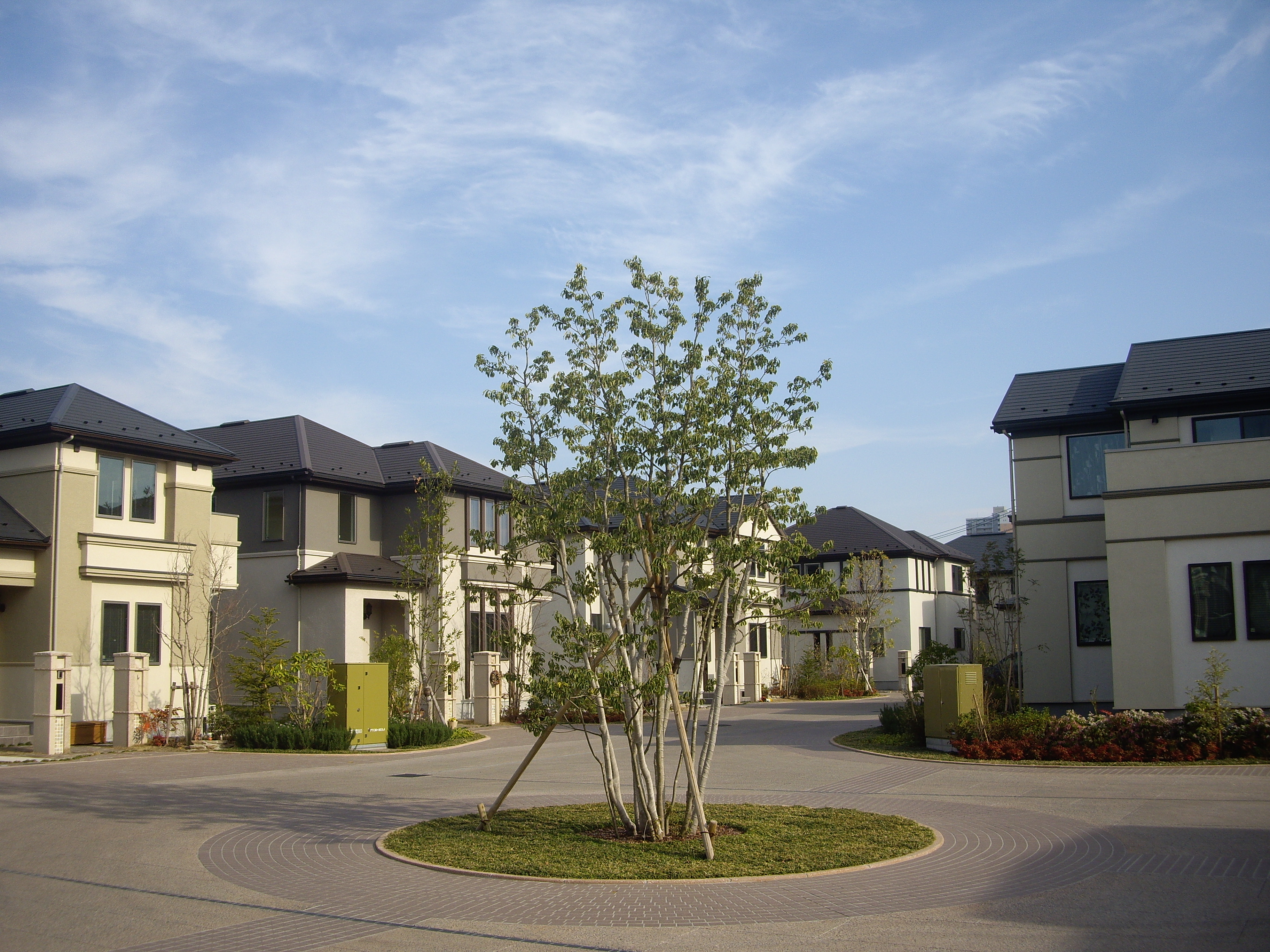 松並(3)